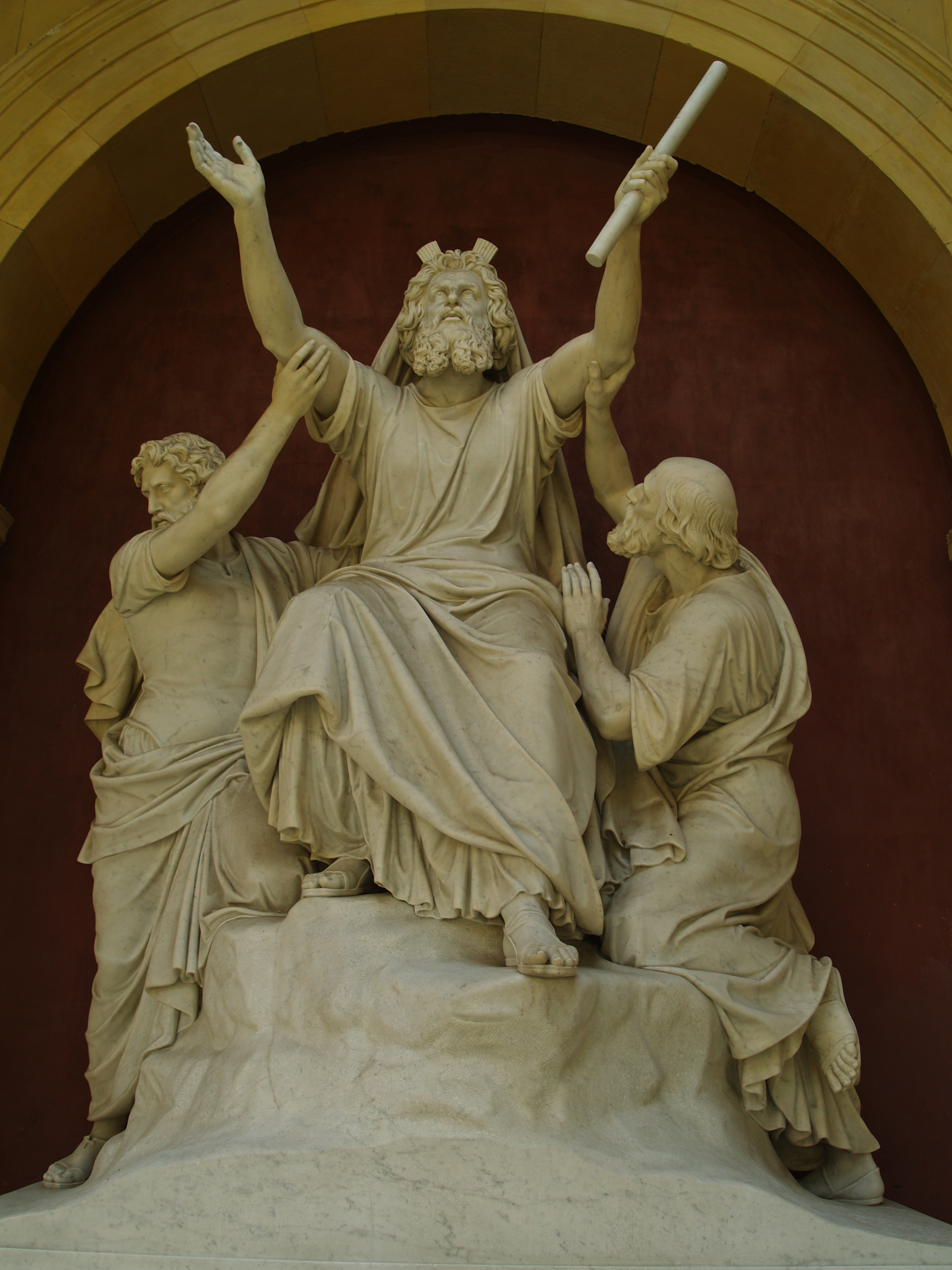 das letzte Werk des Bildhauers Christian Daniel Rauch. Es zeigt Moses im Gebet, gestützt von den Hohepriestern Aaron und Hur